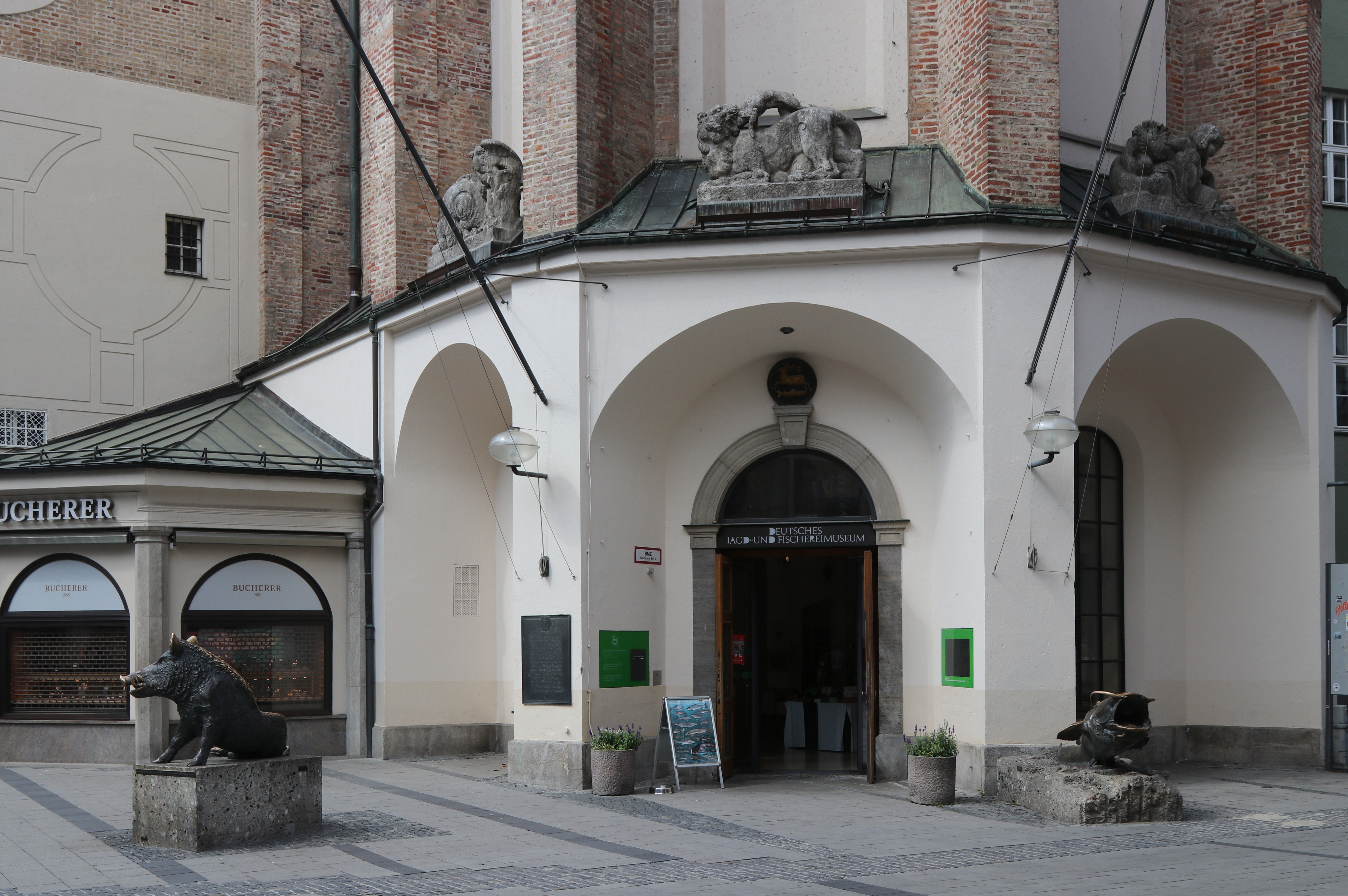 Deutsches Jagd- und Fischereimuseum, Eingang